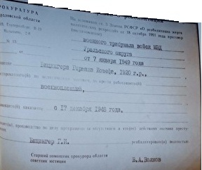 Справка Г.Й. Бицингера. 1992 год. Выдана Свердловской областной прокуратурой в 1992 году (предположительно в апреле 1992 года). Хранится в деле Бицингера в архиве Свердловской области